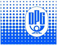 Logo der ehem. Deutschen Postgewerkschaft (DPG)